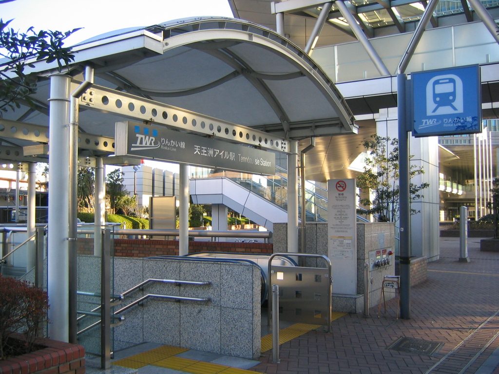 Tennozu Isle Station (A Exit)